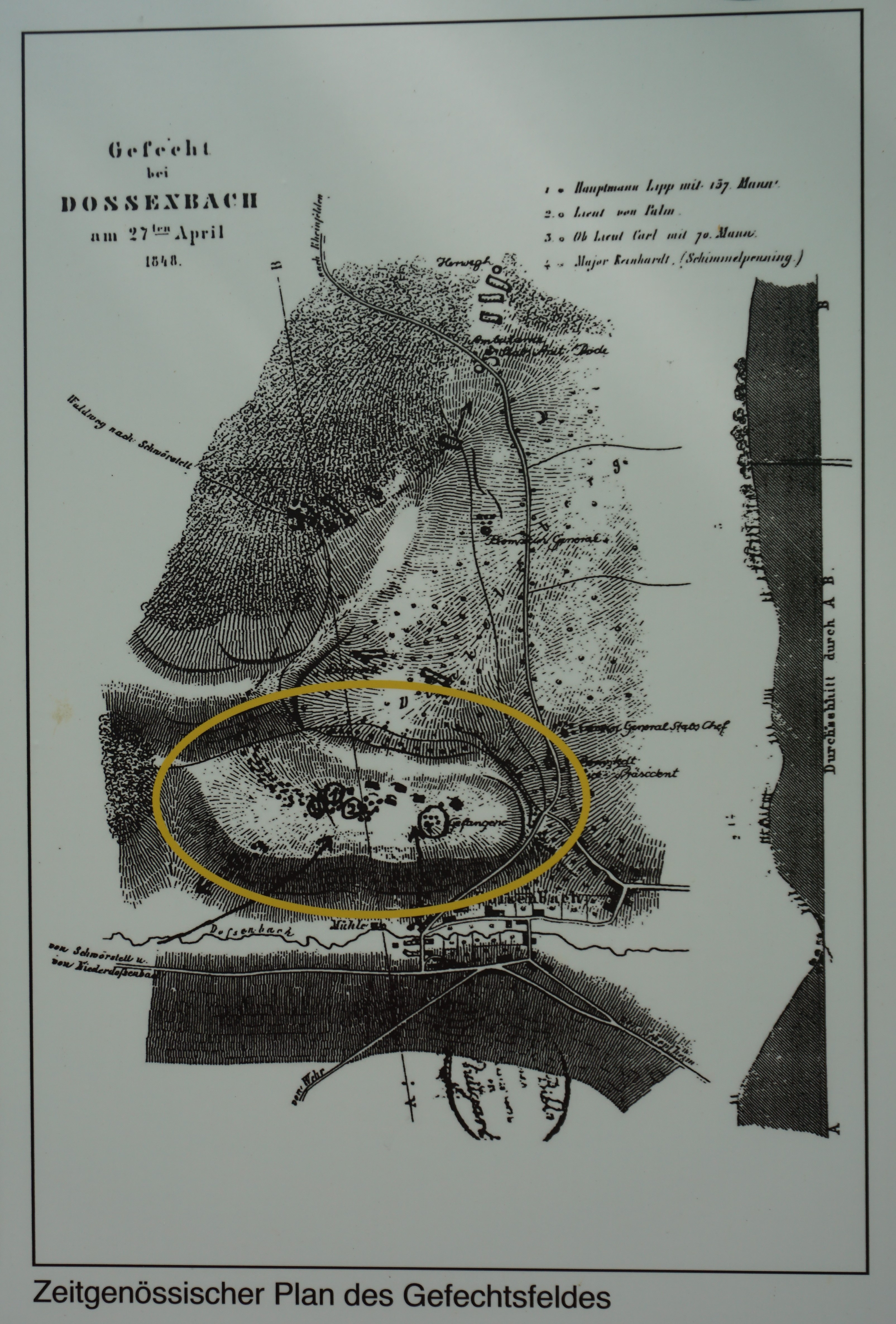 Detail aus Info-Tafel zwei des historischen Weges in Dossenbach - zeitgenössischer Gefechtsplan.